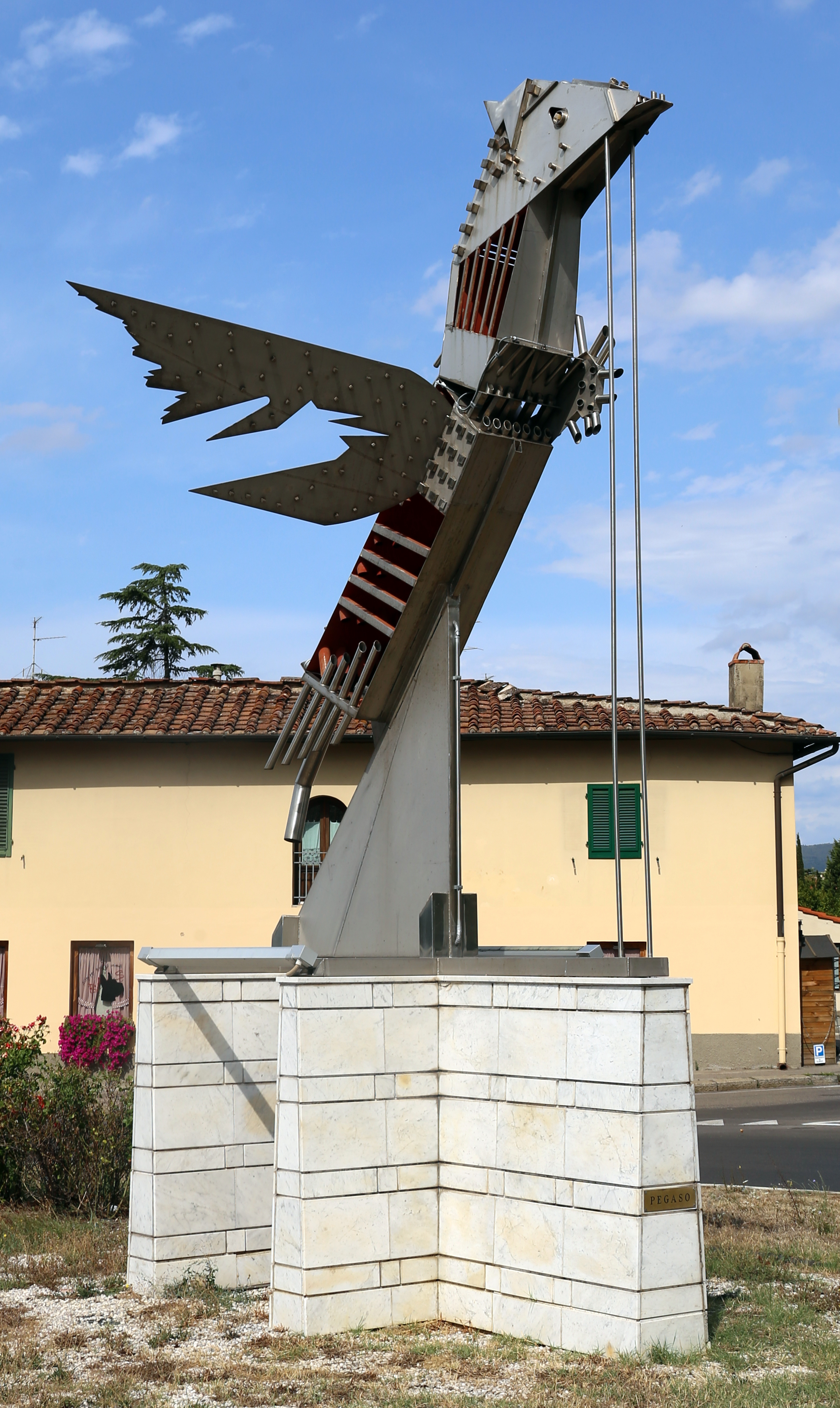 Pegaso This is a photo of a monument which is part of cultural heritage of Italy.